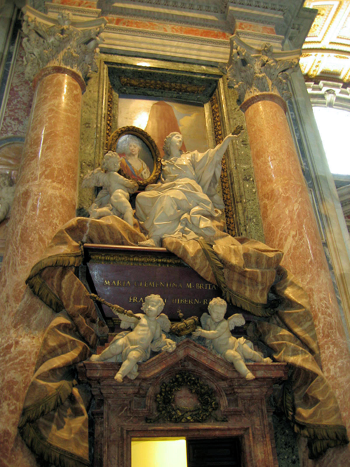 Pietro Bracci - Monument to Maria Clementina Sobieski (1744). San Pietro in Vaticano, Roma. Picture by Torvindus.